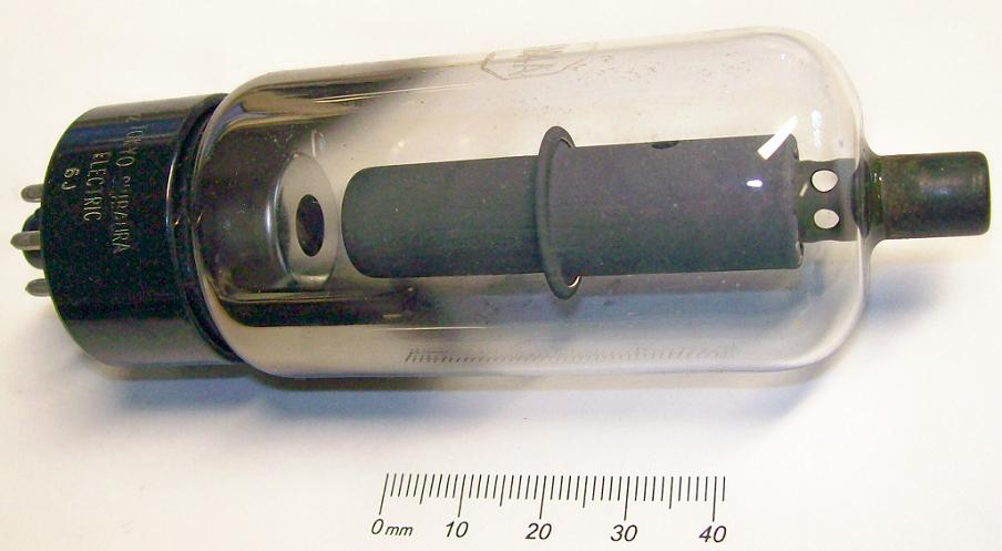 Strahltriode (beam triode), hohle Anode rechts (cylindrical hollow anode), Gitter und Kathode links hinter dem Loch (left behind the hole: grid and cathode).